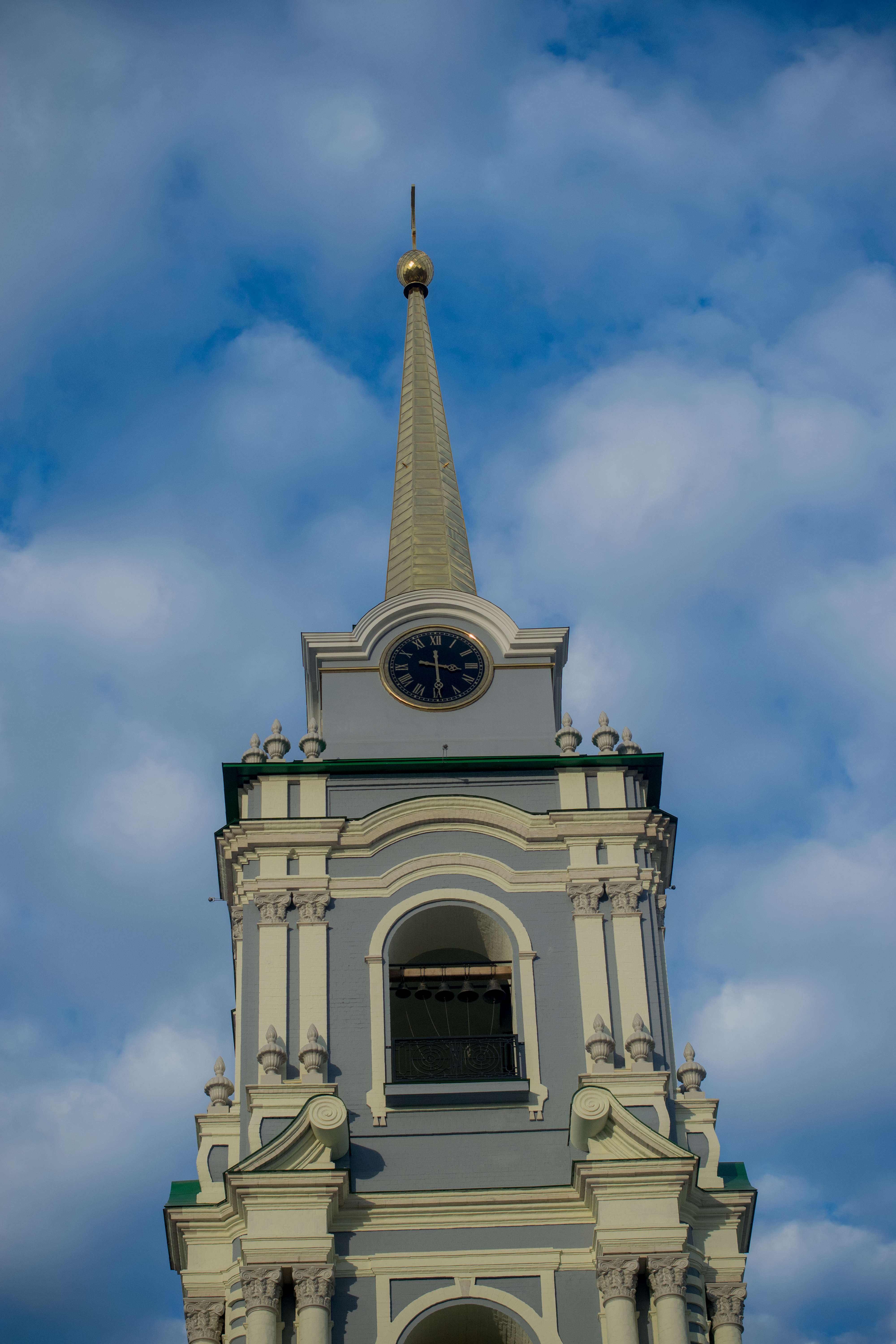 Собор Успенский (Тульская область, Тула, Кремль, (лит. И, И[i]))